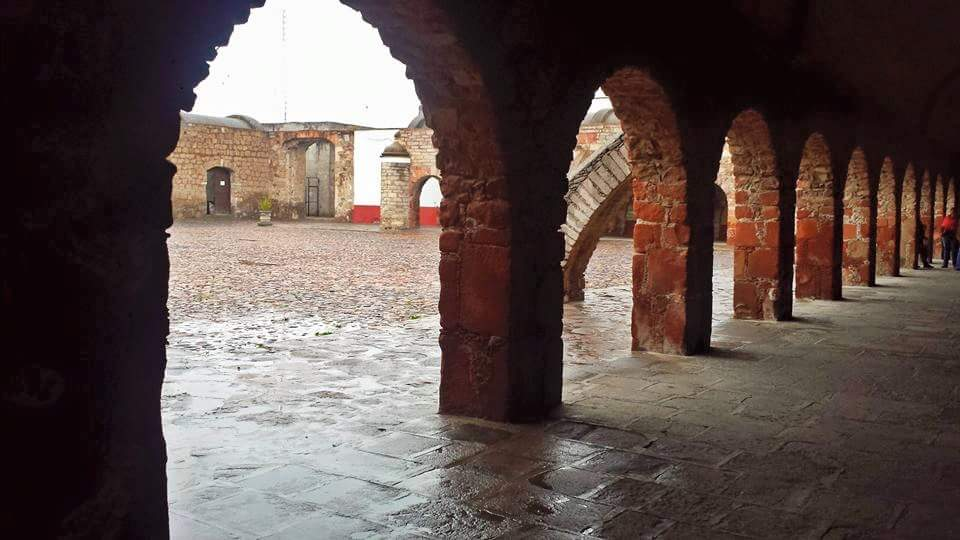 Panorámica del Fuerte de Ojuelos